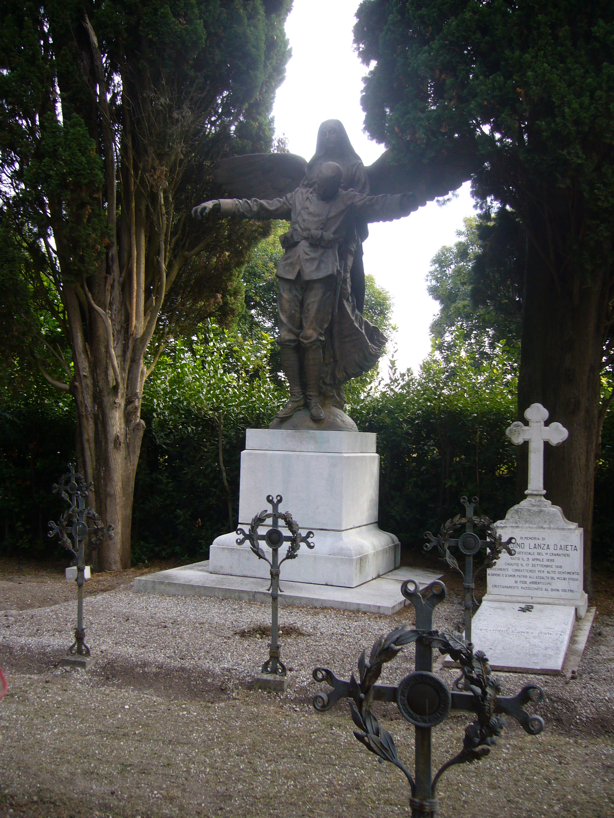 Oorlogsmonument achter de basiliek van Aquileia